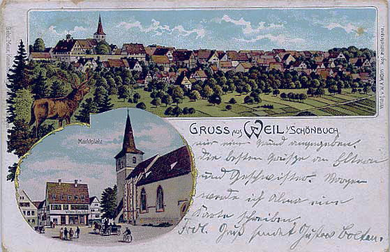 Weil im Schönbuch – Gesamtansicht und Marktplatz. Gezeichnete Ansichtskarte.